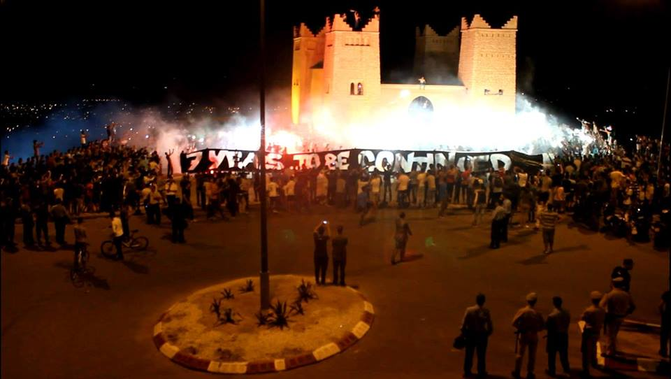 marocco